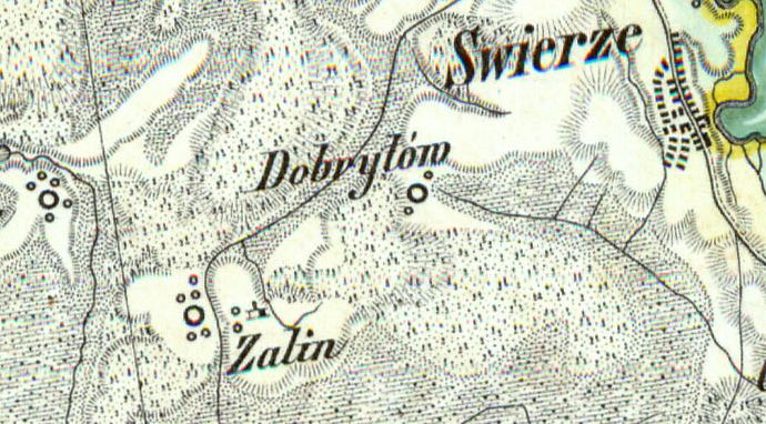 Dobryłów (pow. chełmski) na mapie D.G. Reymanna (XIX w.)